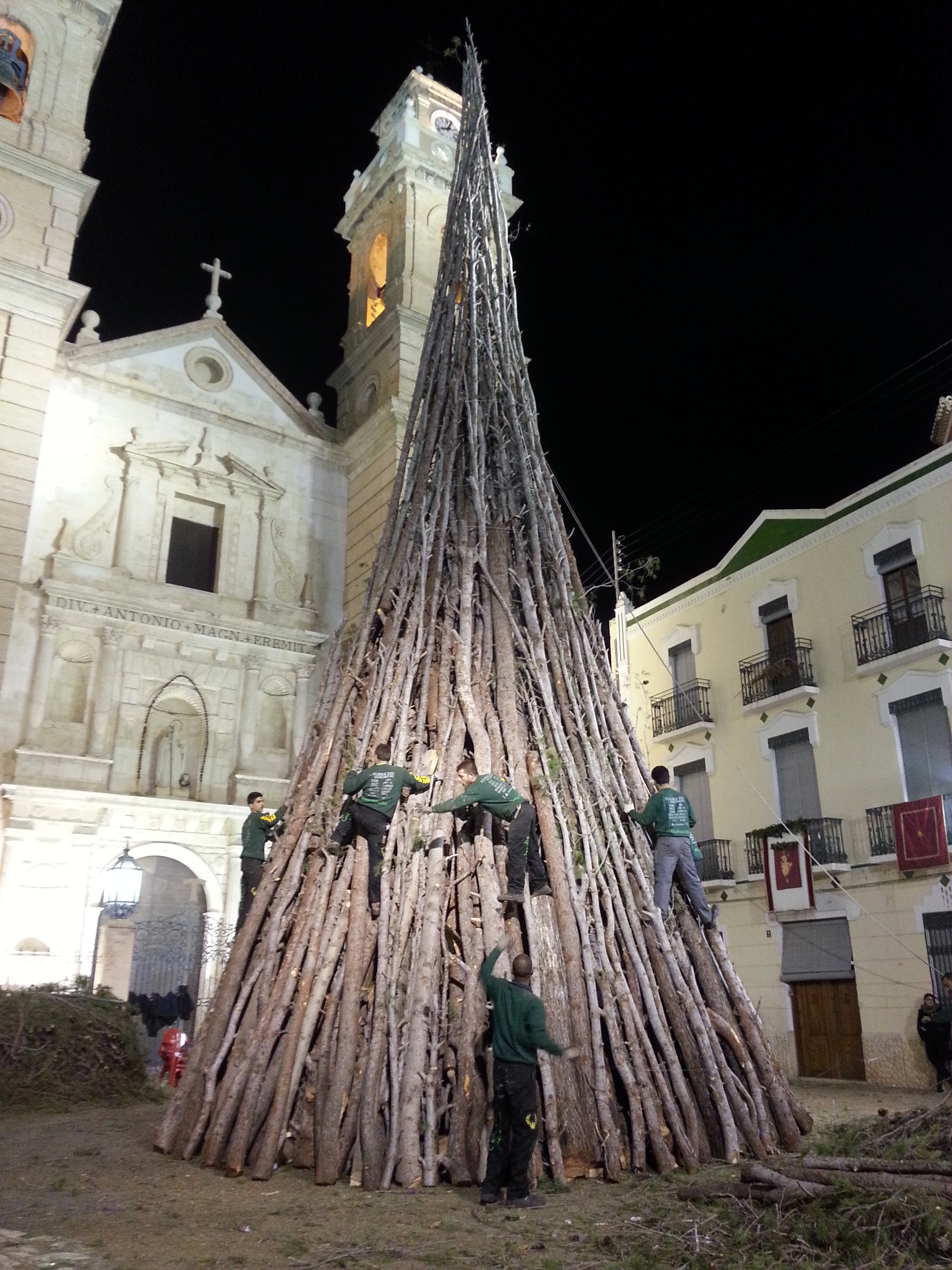 Festers muntant la foguera de Sant Antoni enfront de l'església de Sant Antoni Abat (Canals)